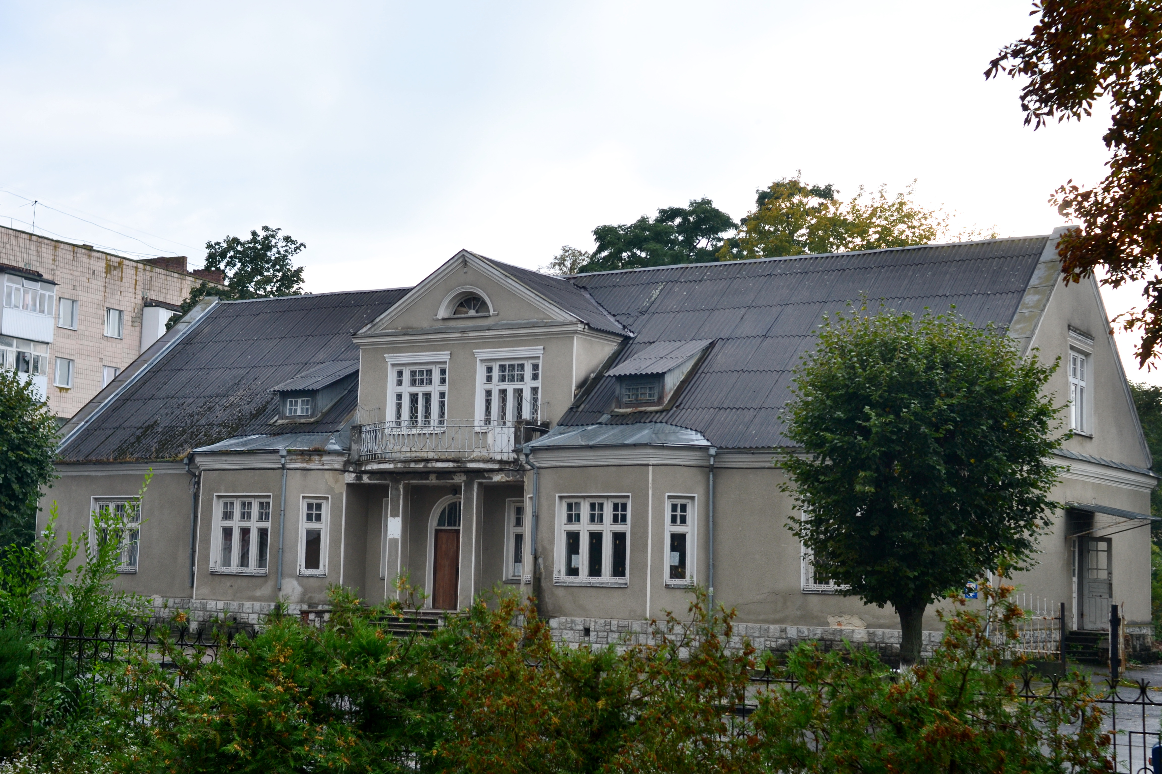 Особняк (мур.) (1920 рік) - вигляд з вулиці - Ковель (вул. С.Бандери, 18) Волинська область Україна